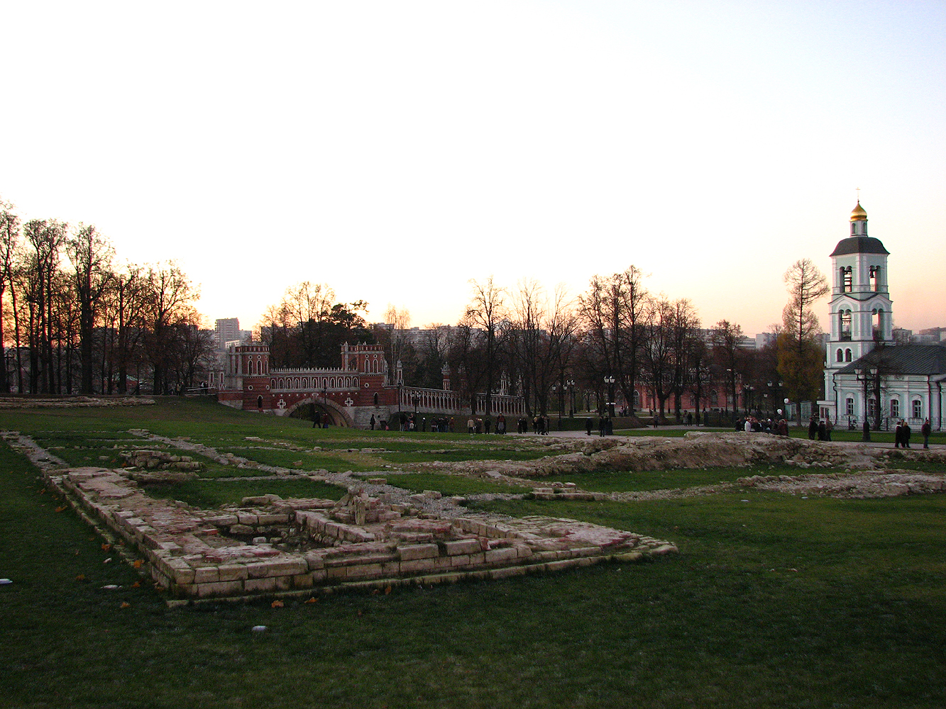 Фундамент разобранного Большого Кавалерского корпуса в Царицынском парке